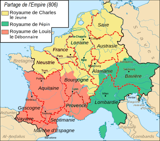 Carte de l'empire de Charlemagne après le partage de 806 dressée d'après Auguste Longnon, 1876.